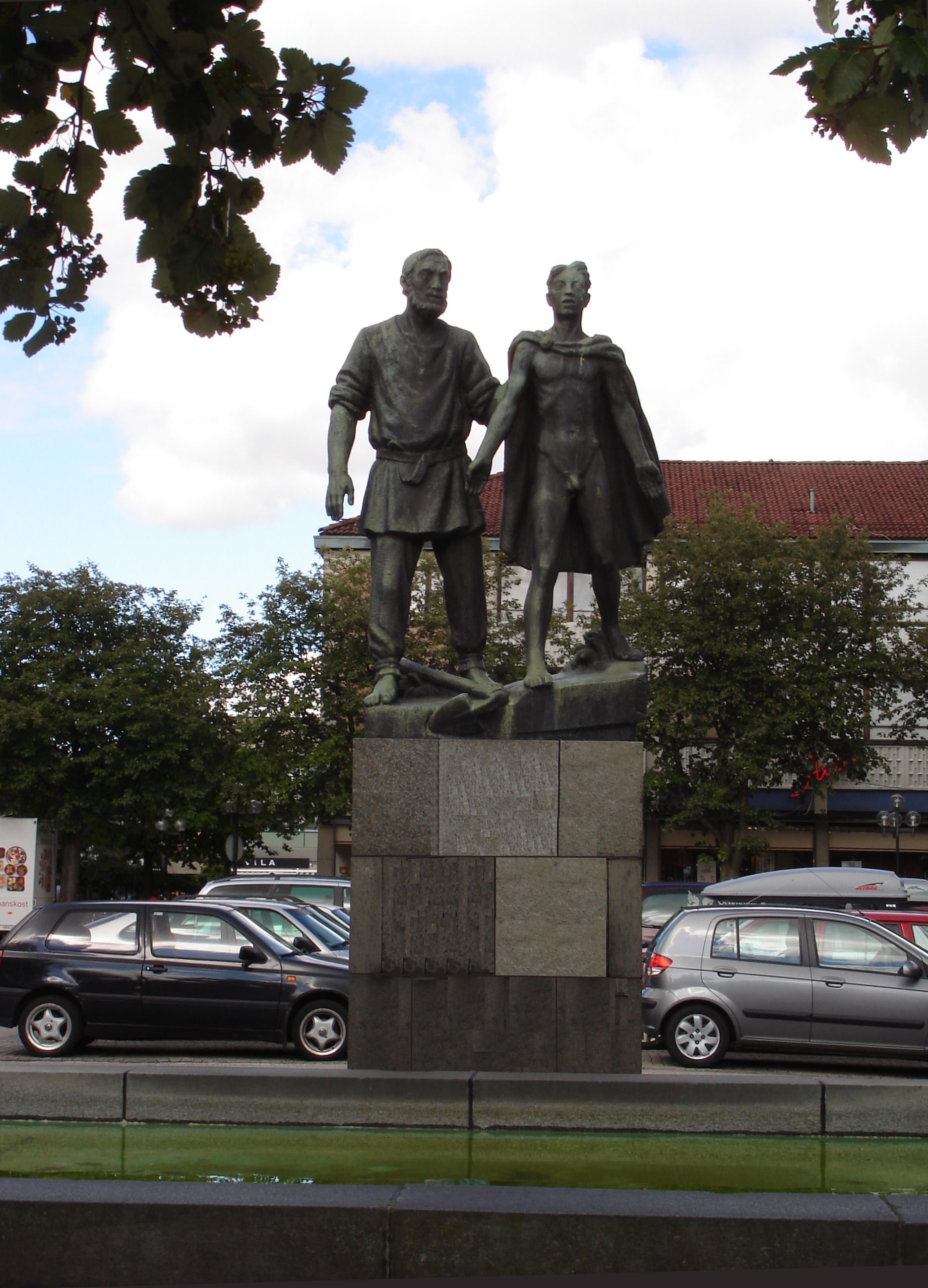 Das Denkmal von Astrad und Götrad in Ljungby / Schweden